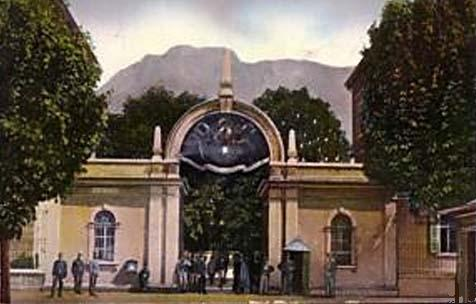 Eingang zur Madruzzo-Kaserne in Trient